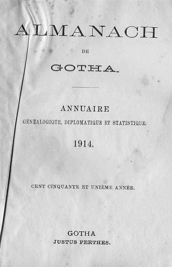 Almanacco di Gotha del 1914